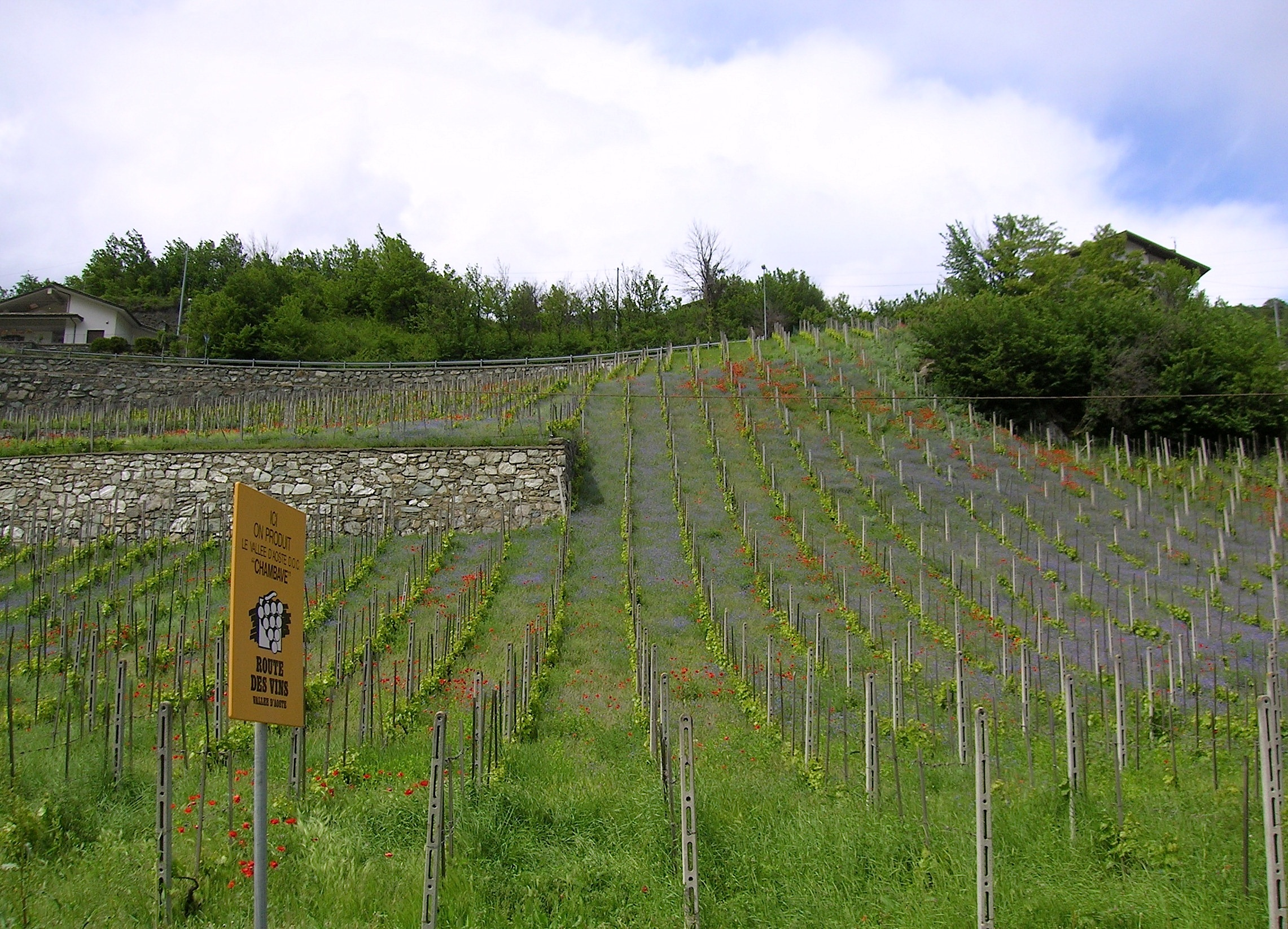 vigna del Valle d'Aosta Chambave Moscato